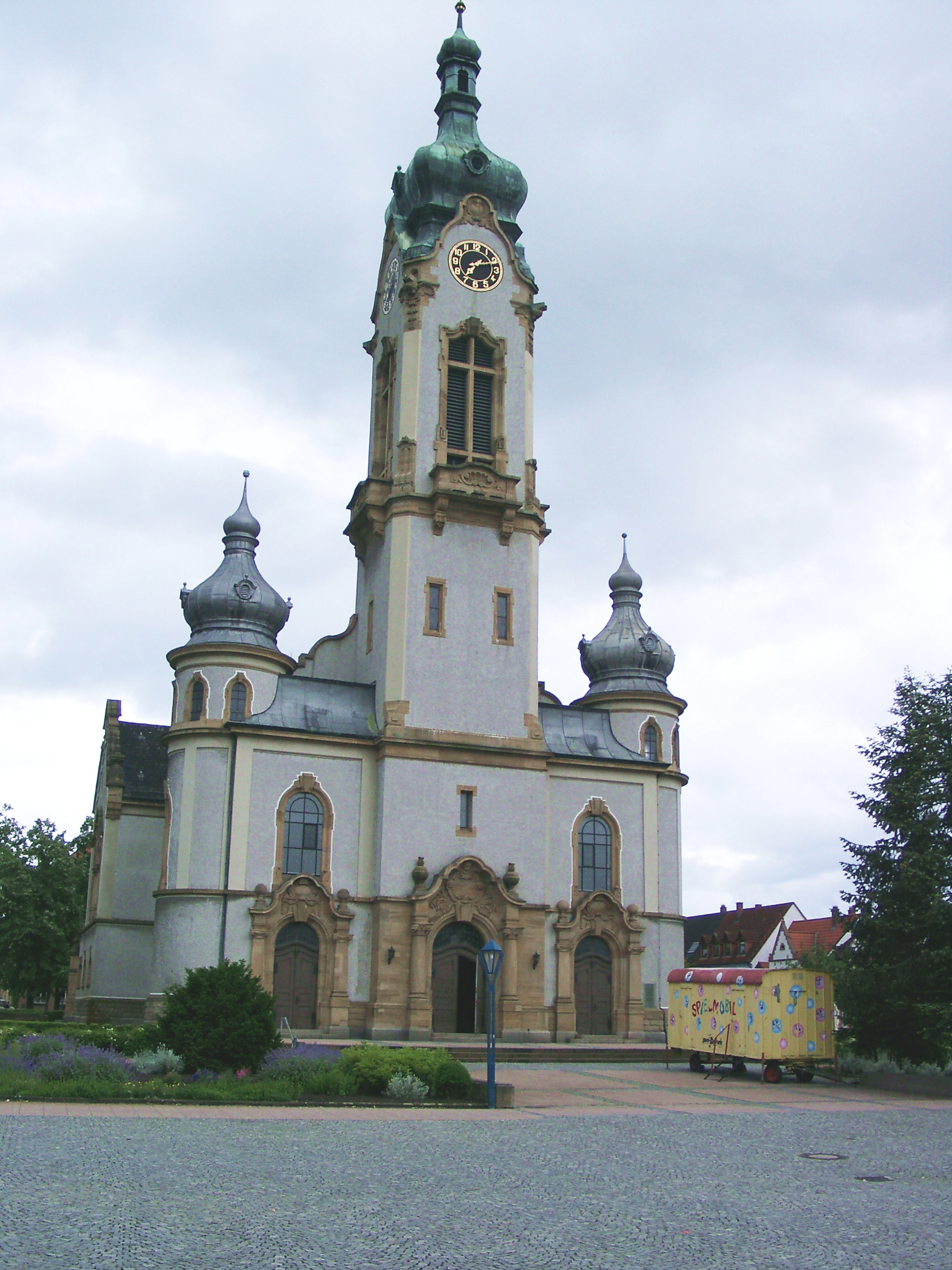 Hockenheim, evangelische Kirche